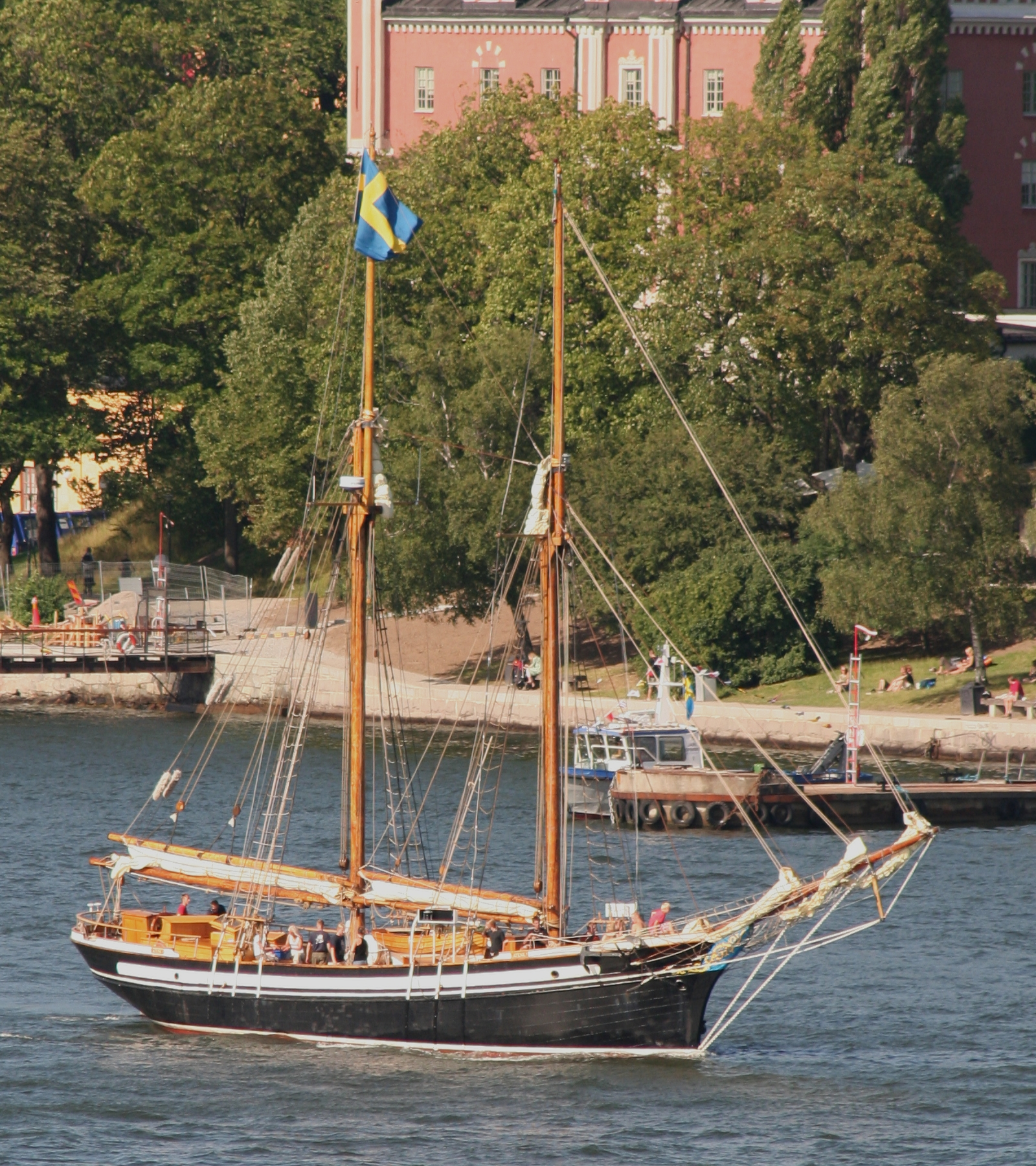 Skonerten Atene i Stockholm under Tall Ships' Races 2007. Källa: Eget foto, fotograf EnDumEn 26 juli 2007.